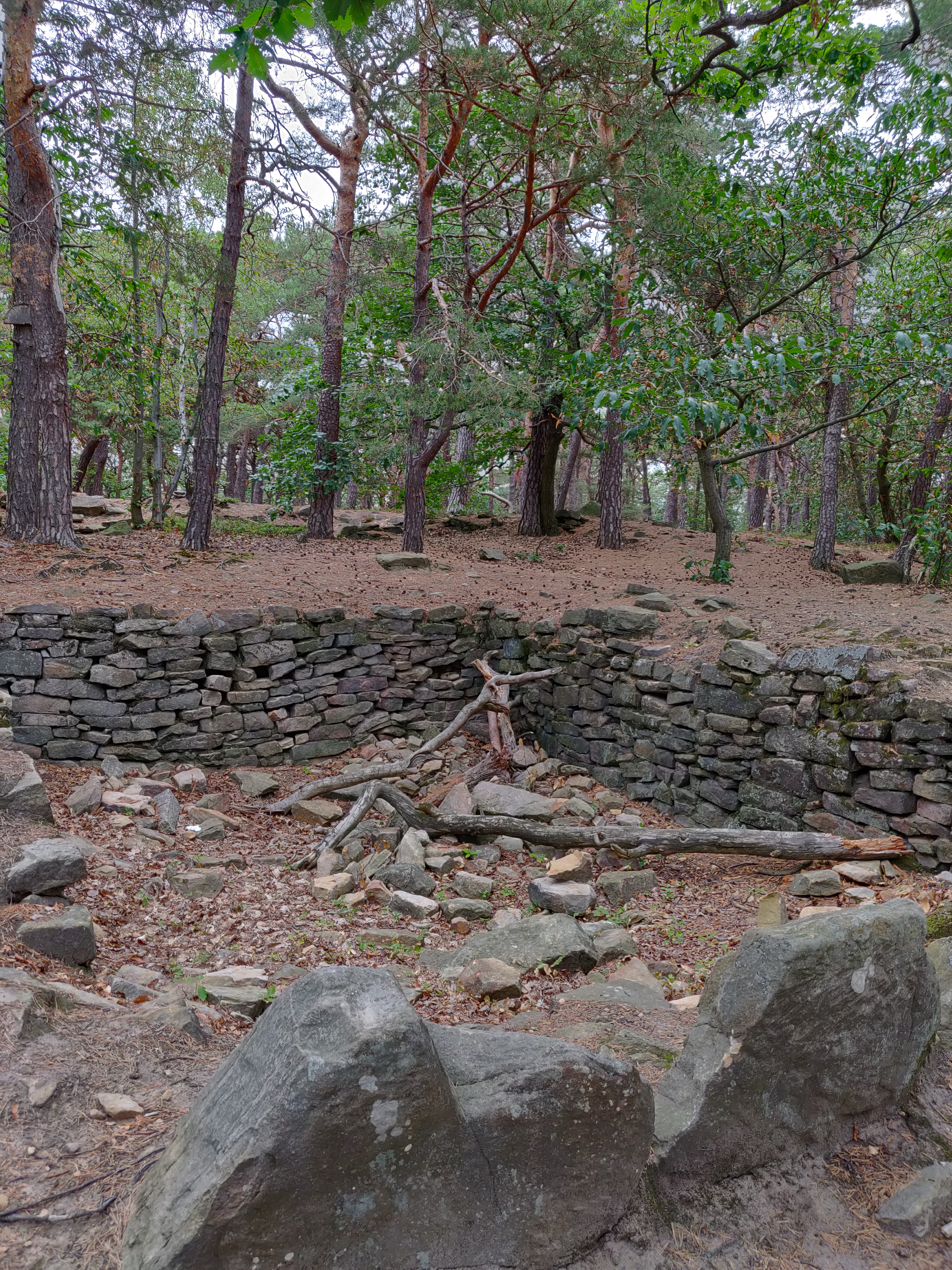 Ein »Heidenloch« der Fliehburg bei Deidesheim (Pfalz)